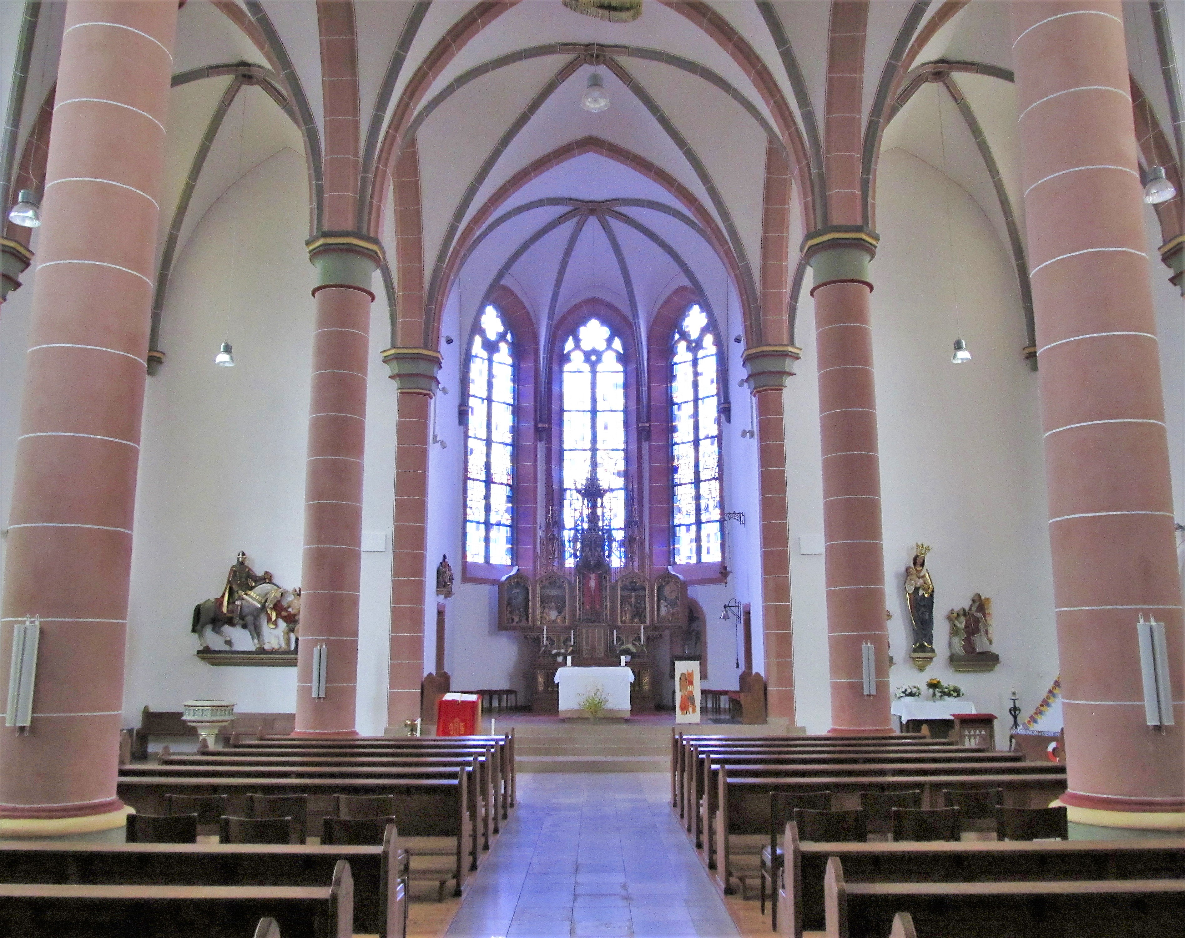 Blick ins Innere der katholischen Pfarrkirche St. Martin in Schiffweiler, Landkreis Neunkirchen, Saarland